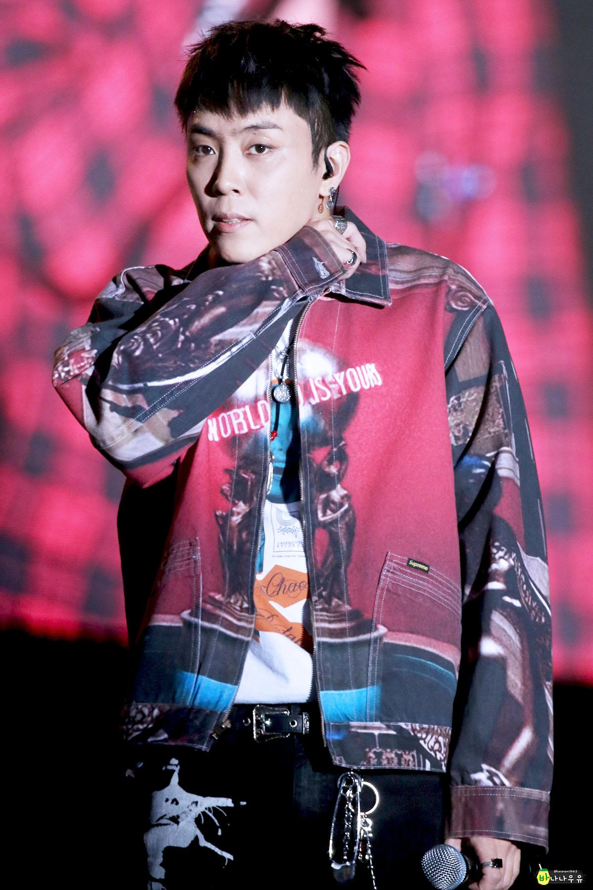 20180106 젝스키스 20주년콘서트 @대구